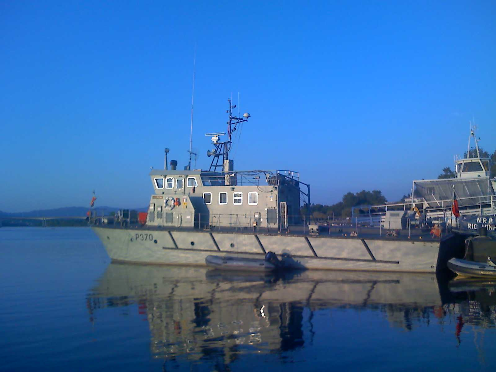 Lancha de fiscalização NRP Rio Minho da Marinha Portuguesa, ancorada em Vila Nova de Cerveira.